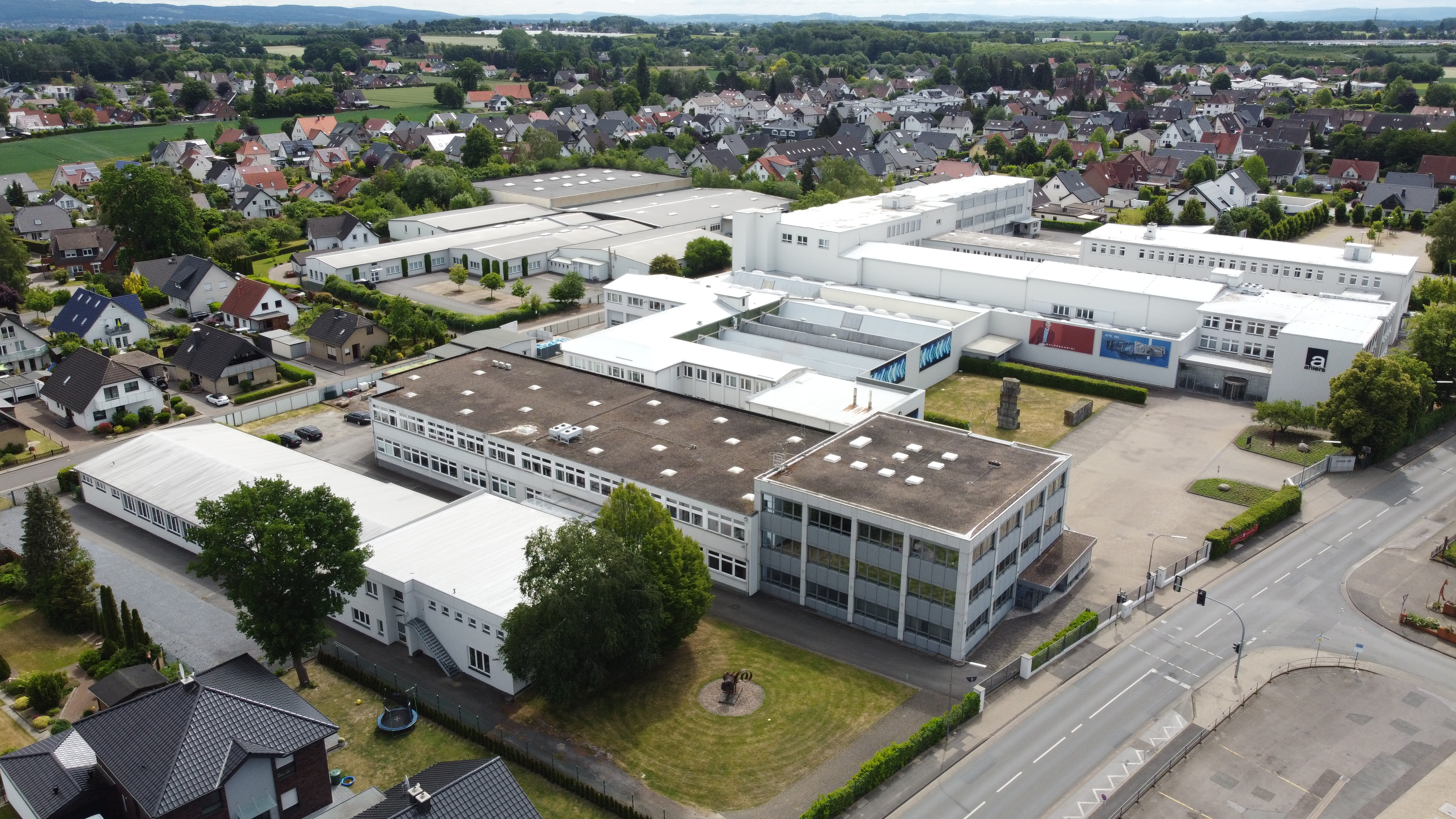 Ahlers Unternehmen in Herford-Elverdissen Luftbild mit Drohne